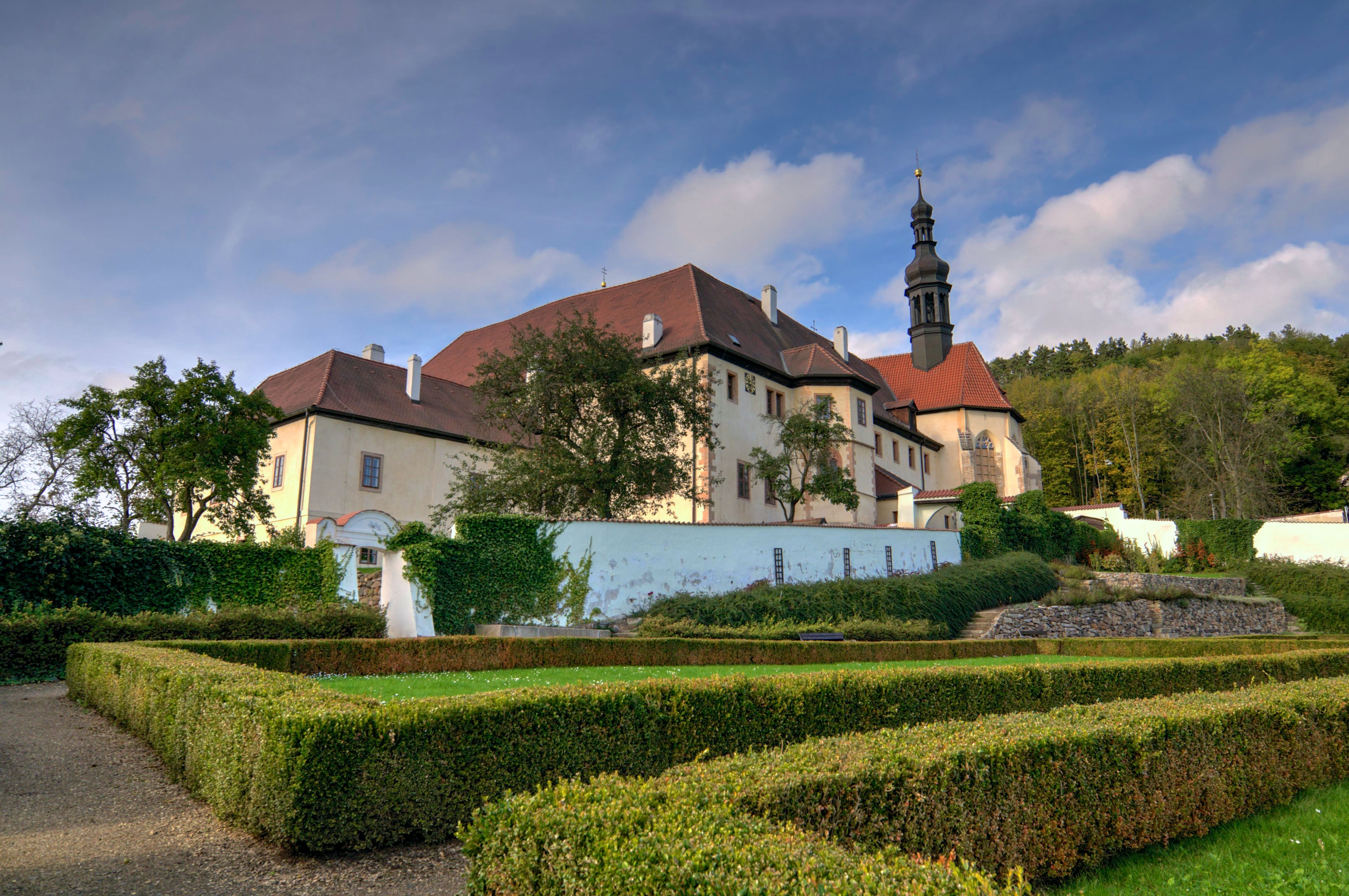 Františkánský klášter Čtrnácti sv. Pomocníků, Jana Švermy 474, Kadaň.